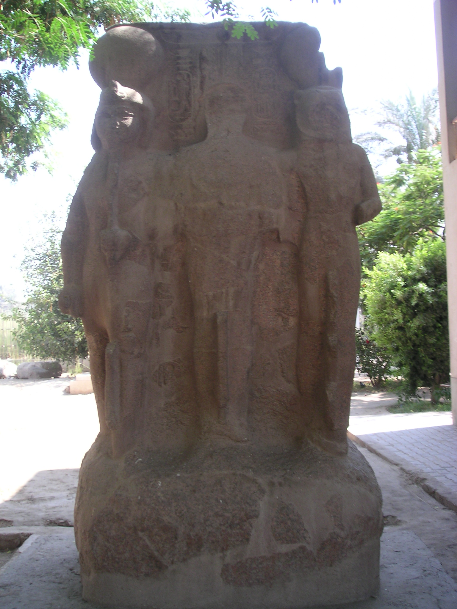 Triade Ramsès II-Ptah-Sekhmet du musée en plein air de Memphis - XIXe dynastie - Mit Rahineh user:Neithsabes